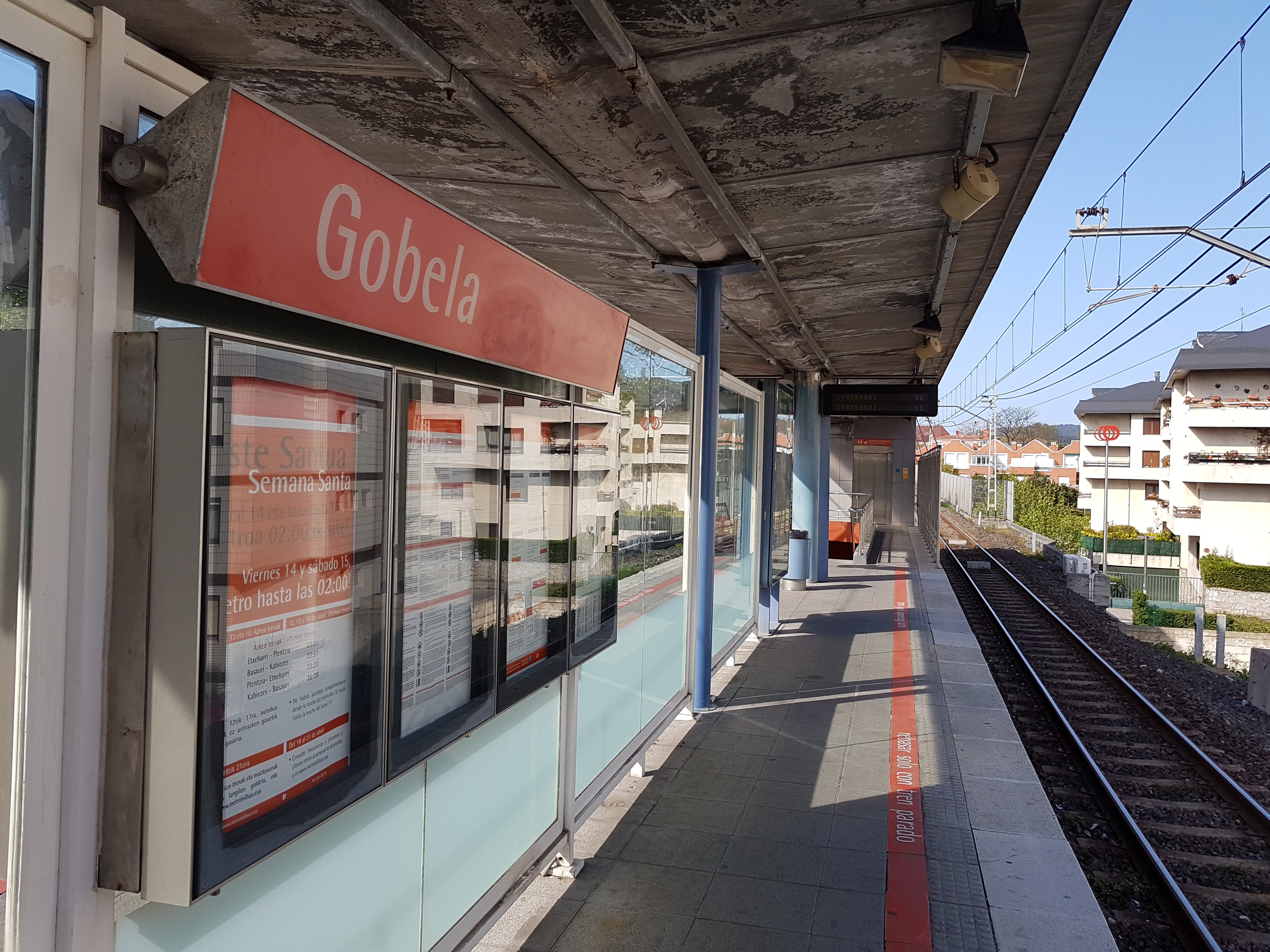 Estación de Gobela.